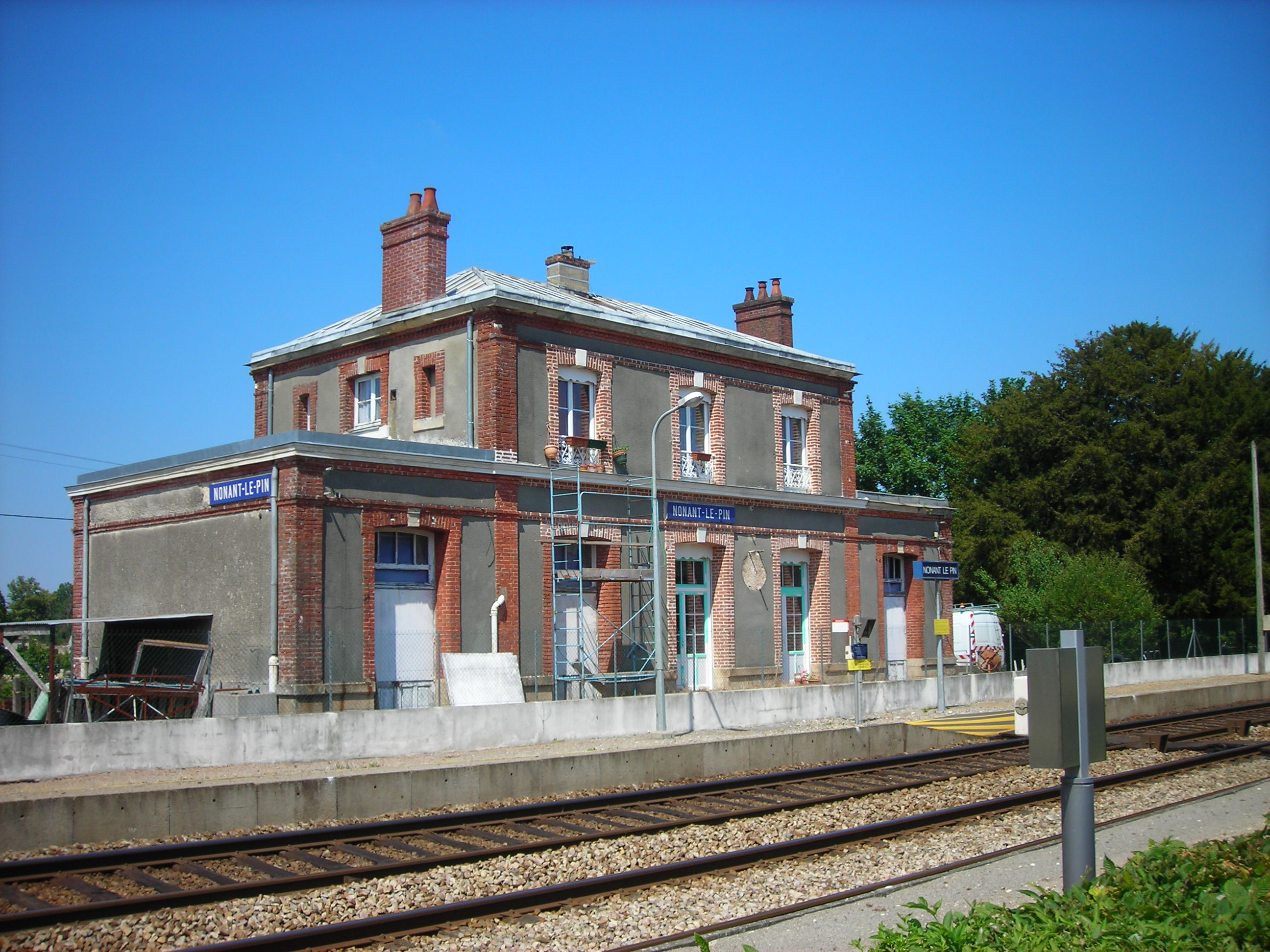 Gare de Nonant-le-Pin (Orne, France), vue de coté quaie, bâtiment voyageur.